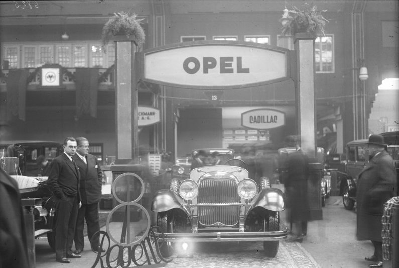 Die Eröffnung der Internationalen Automobilausstellung in den Ausstellungshallen am Kaiserdamm in Berlin! Blick auf den Opel-Stand mit dem neuen Opel-8-Zylinder in der alten Autohalle.